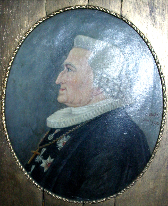 Johan Nordahl Brun. Maleri i Domkirken i Bergen